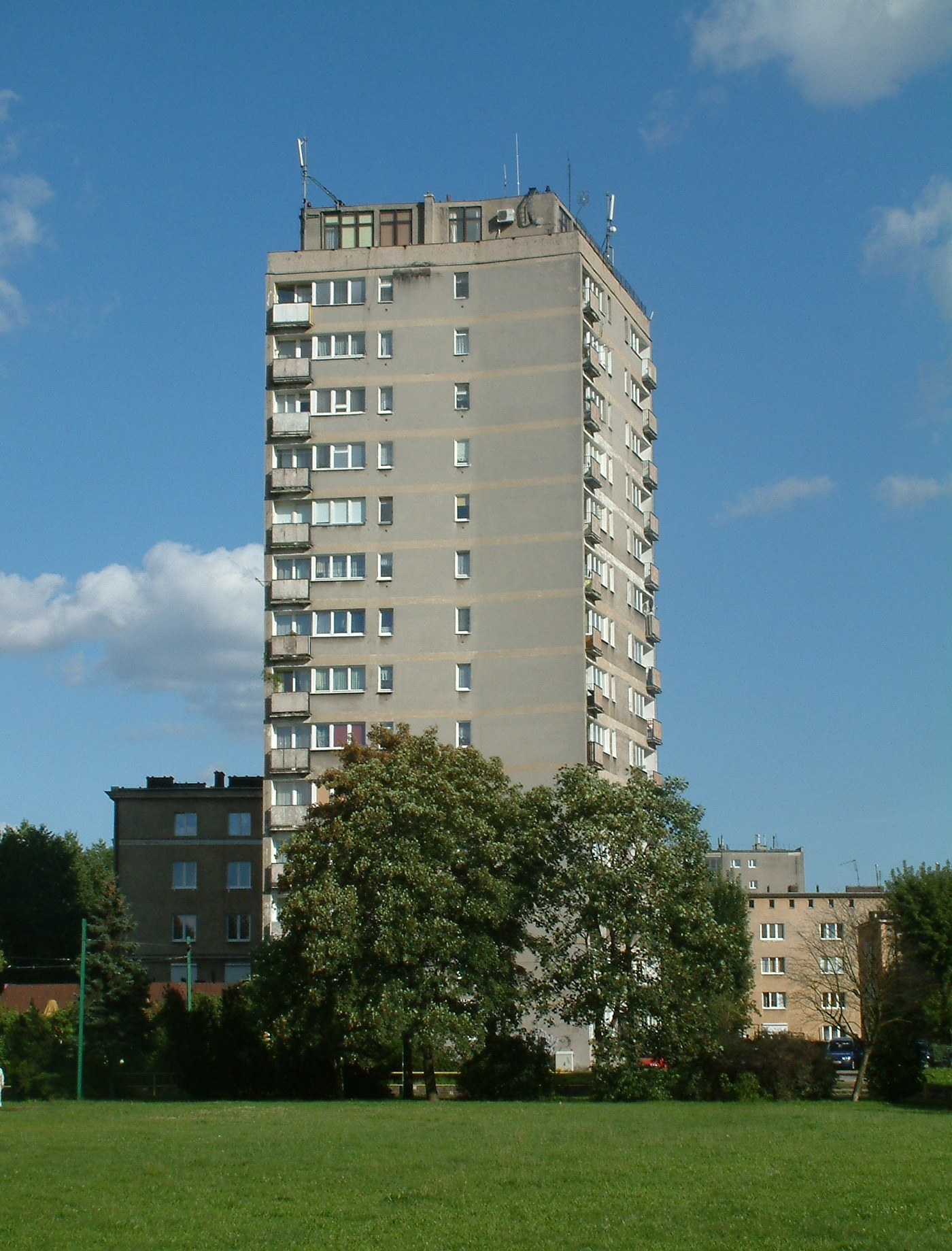 Building on Waryńskiego Sqare 9, Poznań